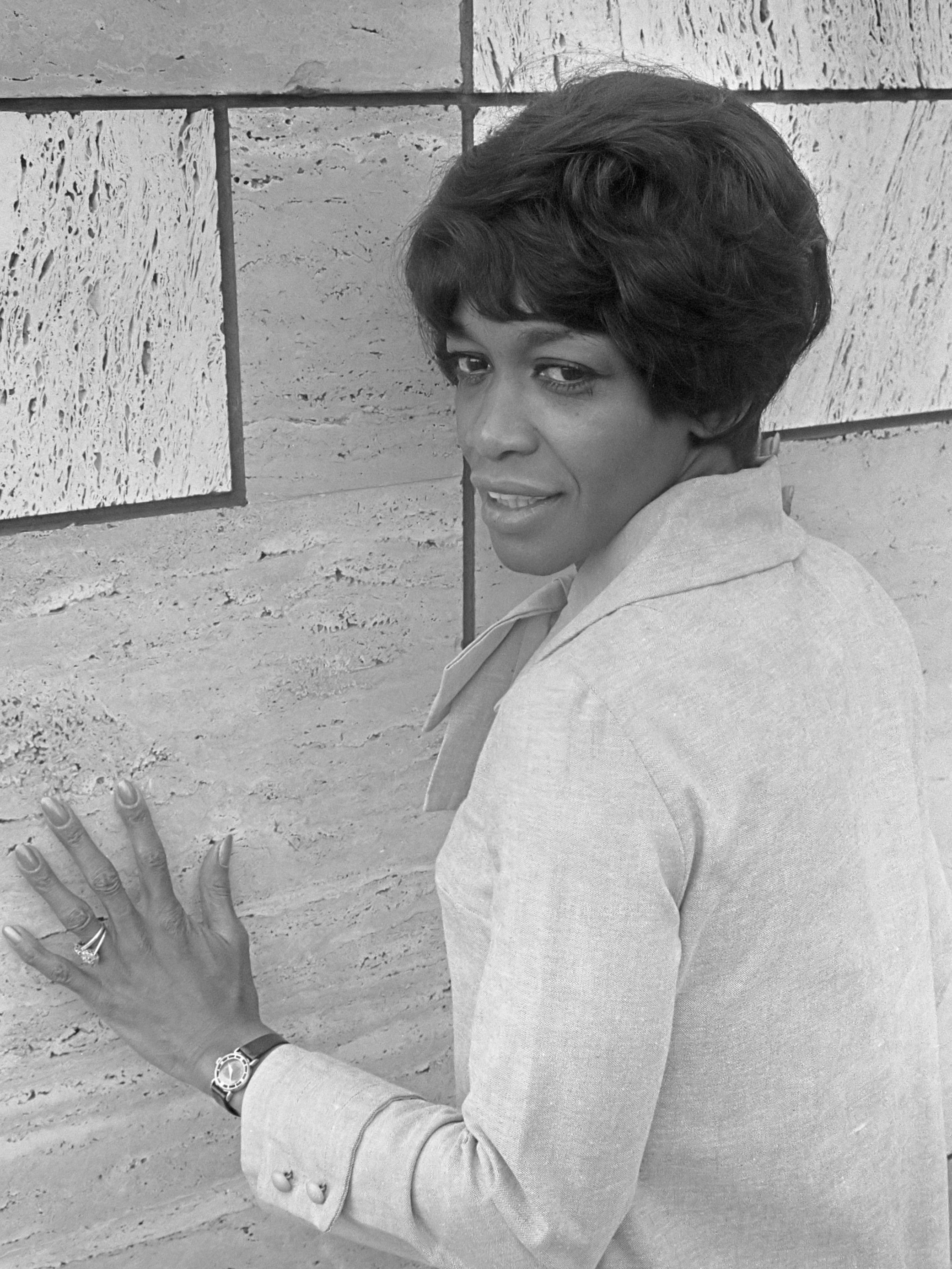 TV: Zomaar een zomeravond (VARA): Salena Jones 10 juli 1970